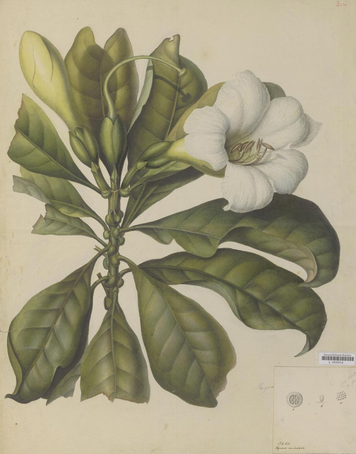 Fagraea auriculata Jack